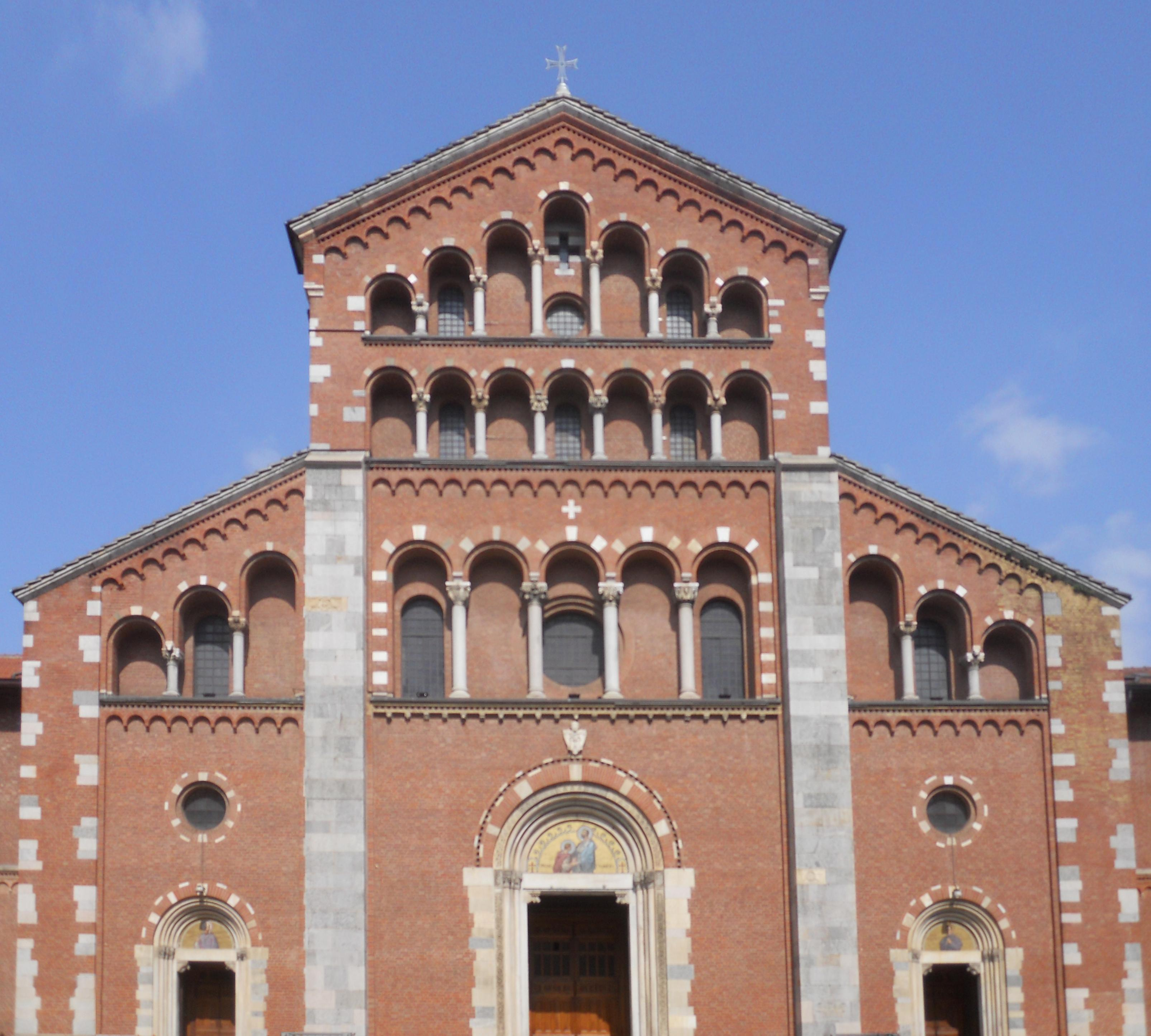 Facciata della basilica di Sant'Agostino a Milano